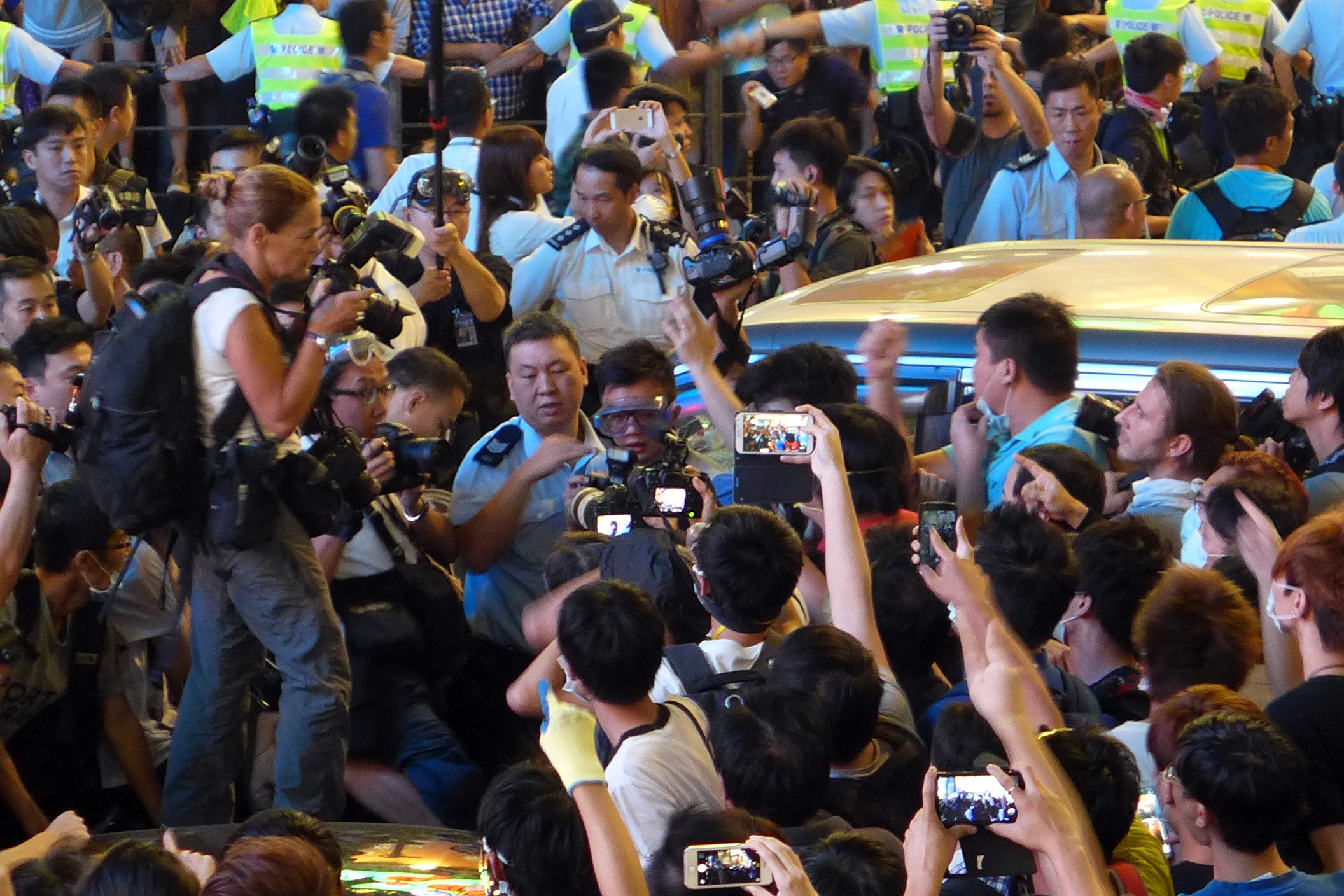 Paula Bronstein in Mong Kok Argyle Street